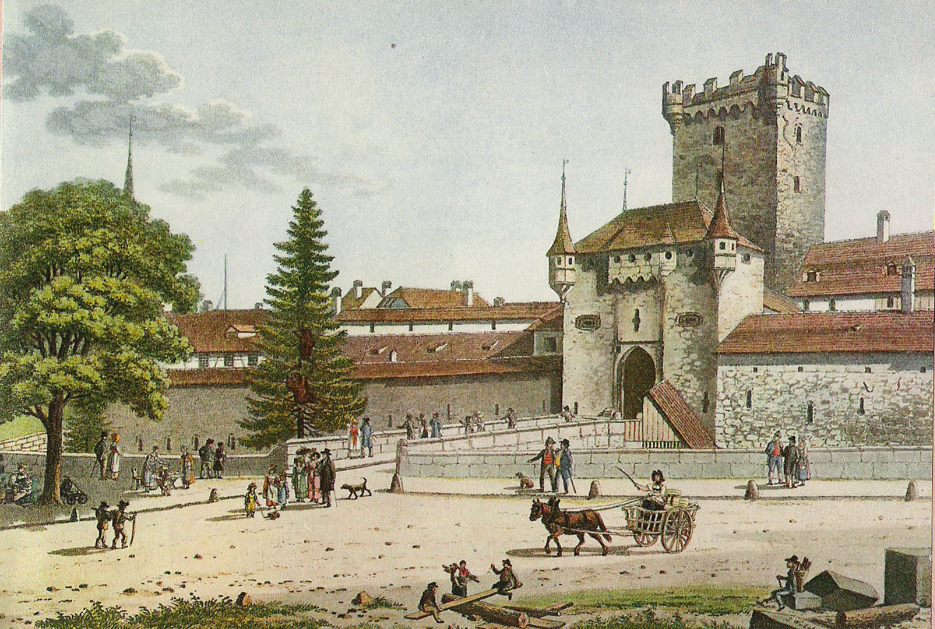 Das innere Aarberger- oder Golatenmatttor in Bern, kolorierte Aquatinta-Radierung von Samuel Weibel, ausgeführt im Jahre 1830 nach einer Zeichnung aus dem Jahre 1796